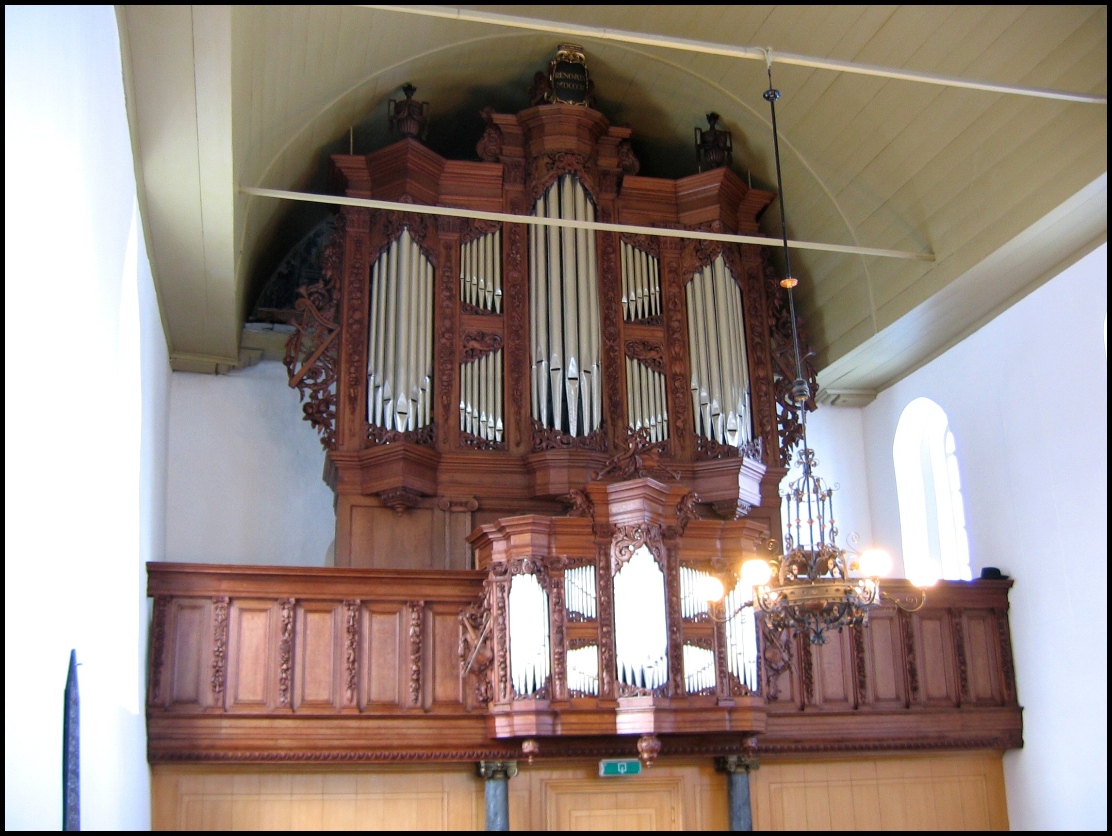 Orgel in Noordwolde, Niederlande